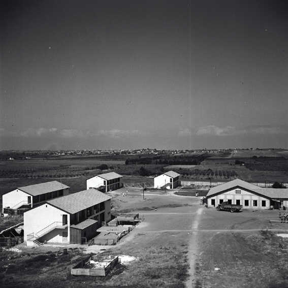 אפעל - בתים ראשונים